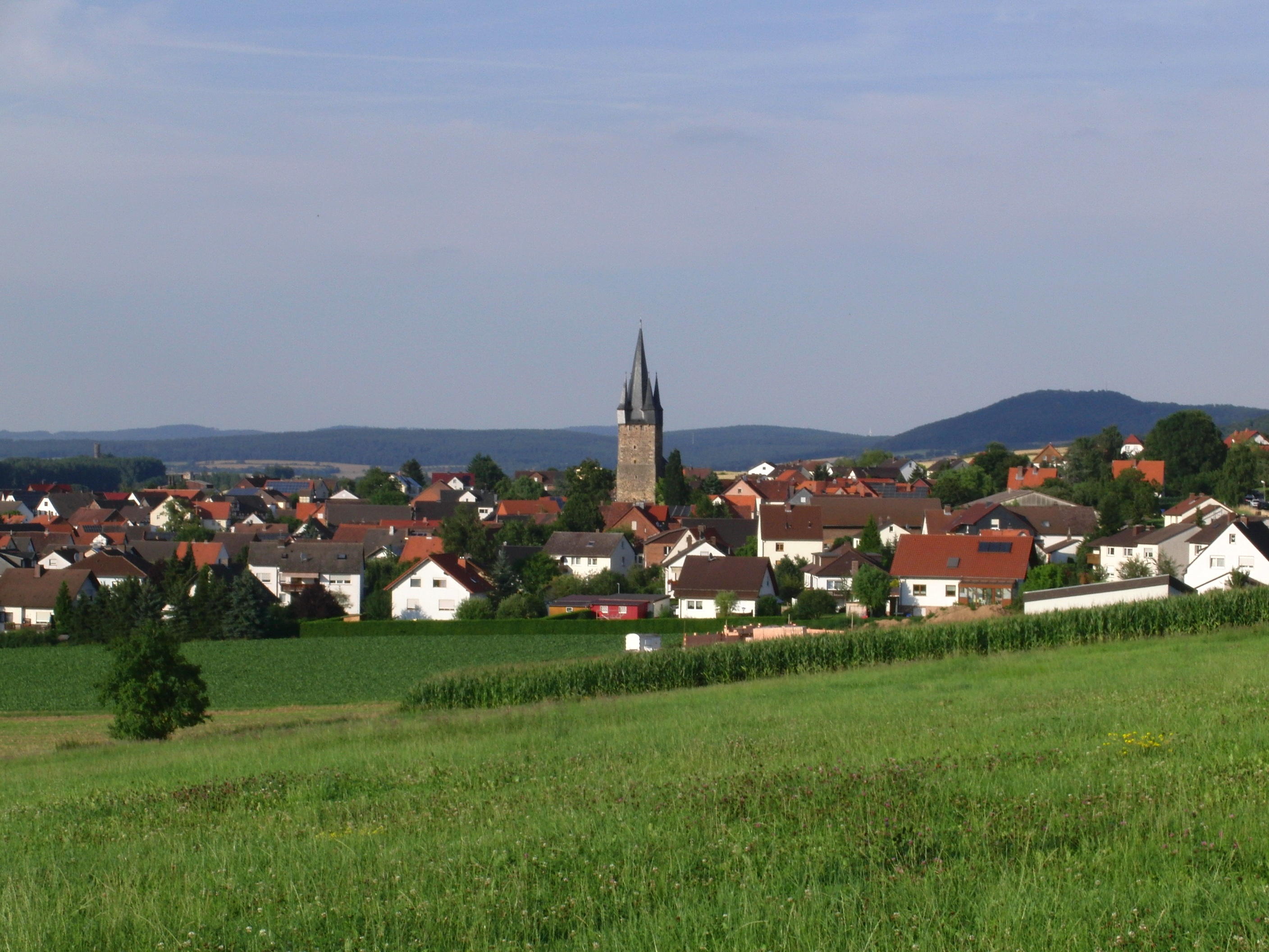 Harle (Wabern, Nordhessen), in der Mitte zu sehen ist die Dorfkirche